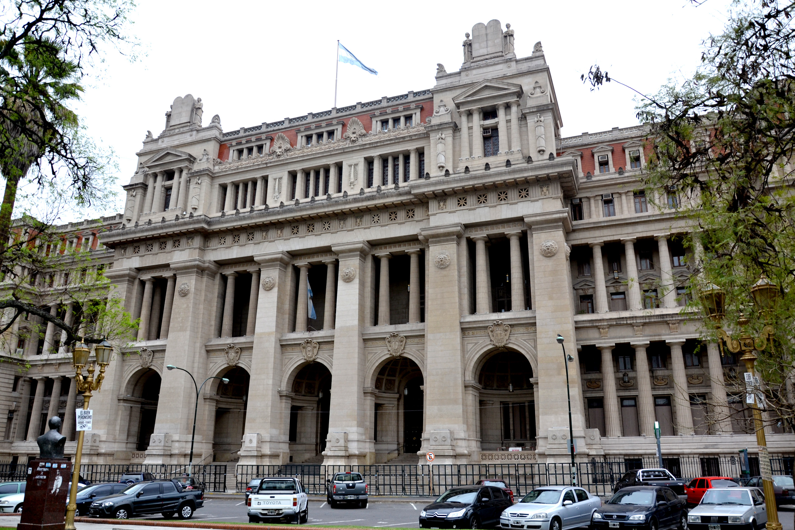 Palacio de Justicia de la Nación